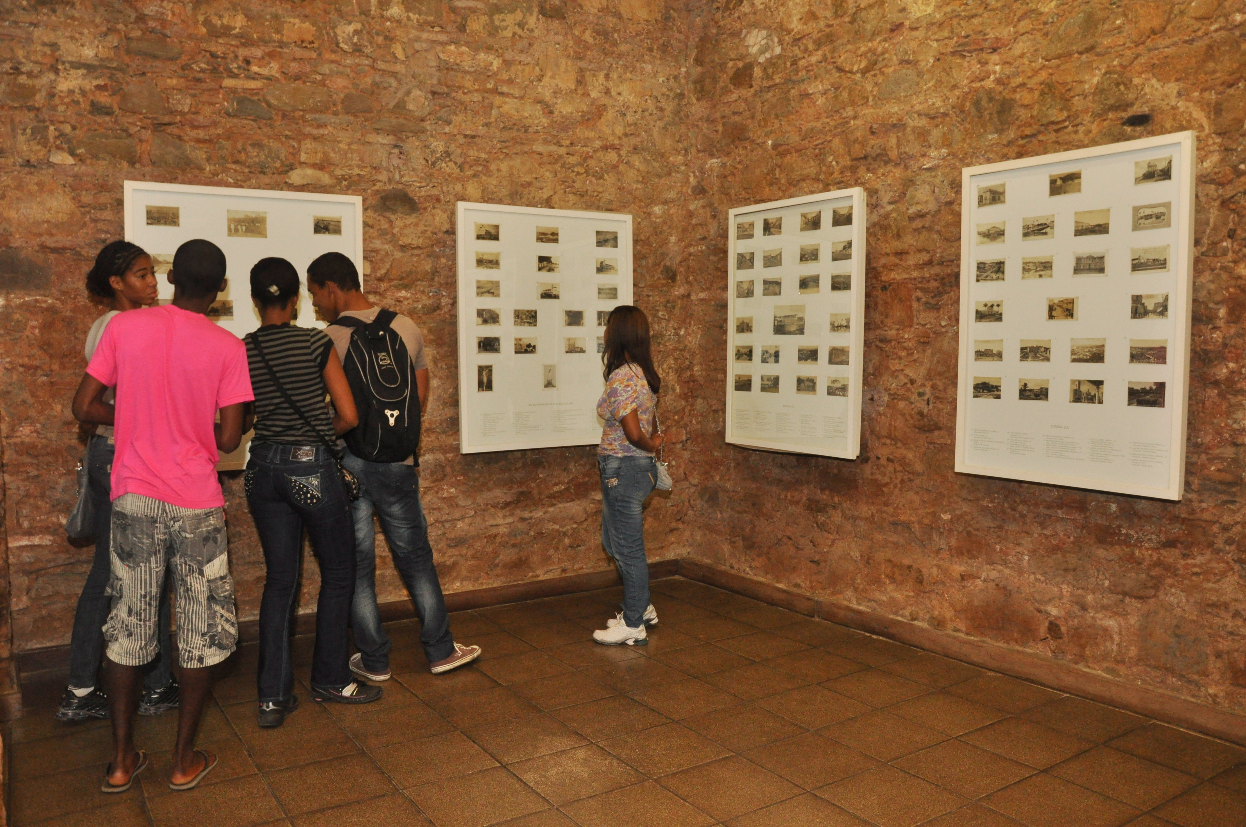 Museu Tempostal - Centro Histórico Salvador Ba. Foto: Rita Barreto - Setur